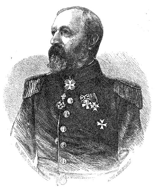 Karl Ludwig August Freiherr von Ende (* 18. Mai 1815 in Waldau; † 28. September 1889 in Dresden) war ein preußischer Beamter, zuletzt Oberpräsident der Provinz Hessen-Nassau und Politiker.